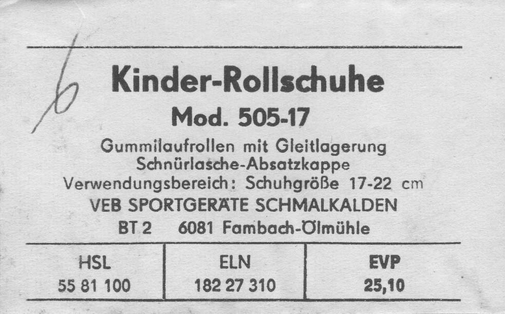 Der staatliche Handel der DDR verkaufte alle Schuhe (auch Rollschuhe) in Kartons. Darauf befand sich das jeweilige Etikett der Herstellers mit den Produktangaben und dem Einheitsvertriebspreis (EVP).